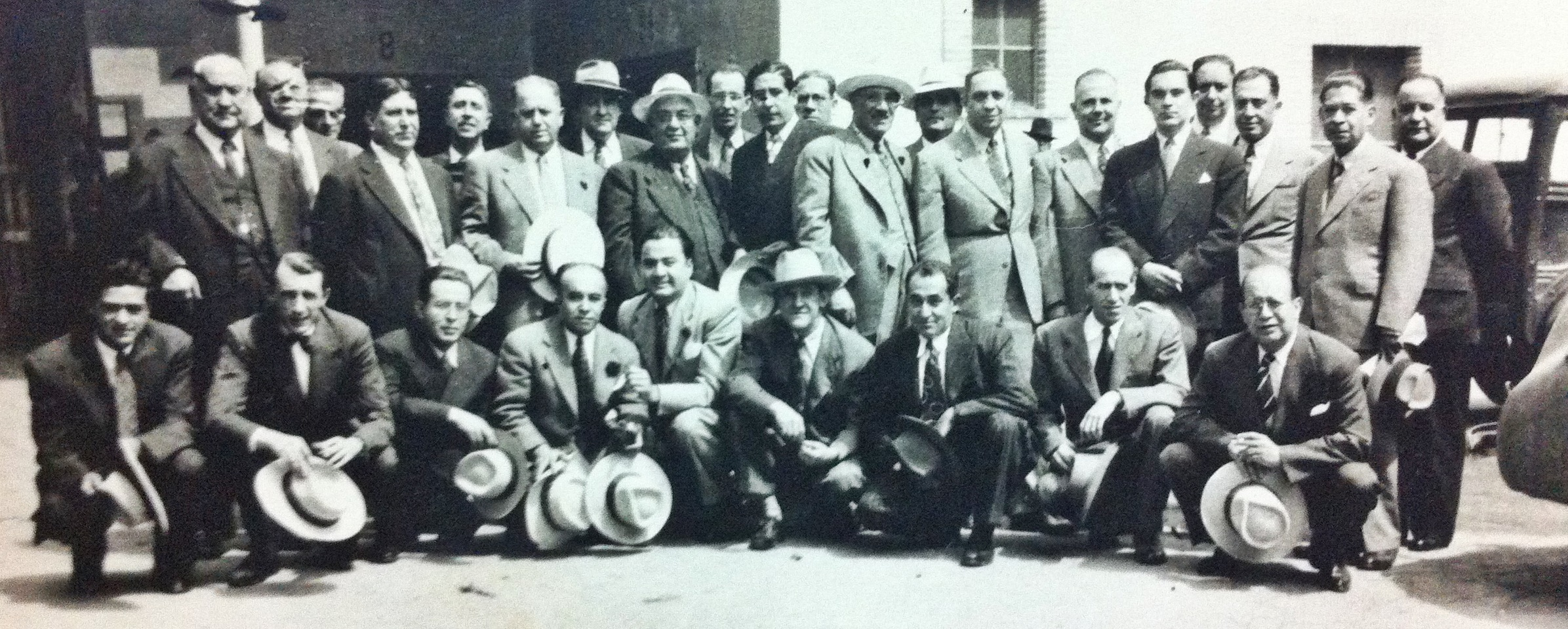 Inmigrantes italianos en la sombrerería ITALIA con el caballero Mario Zumpano 1935.